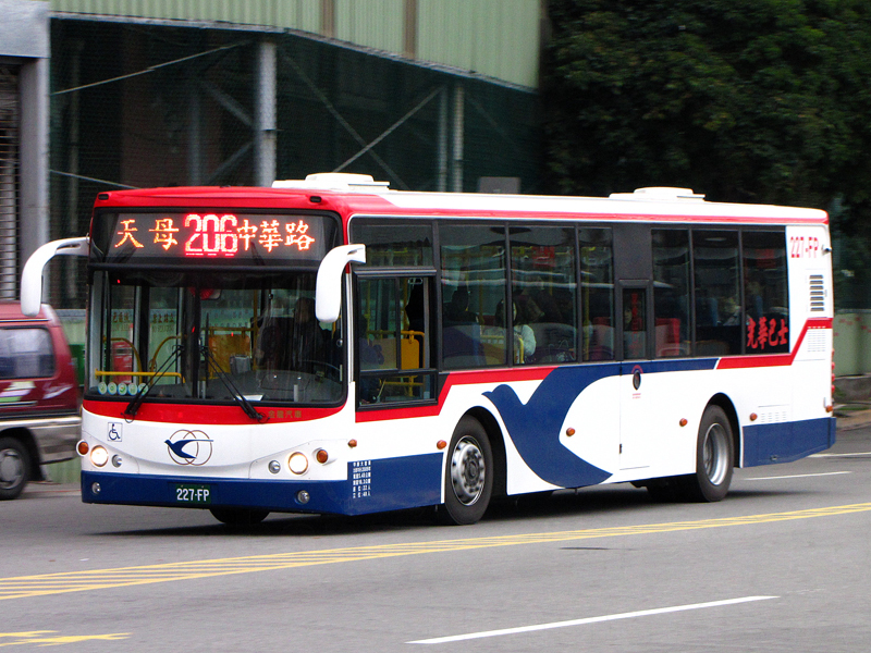 光華巴士KINGLONG KL6112U1大客車227-FP。